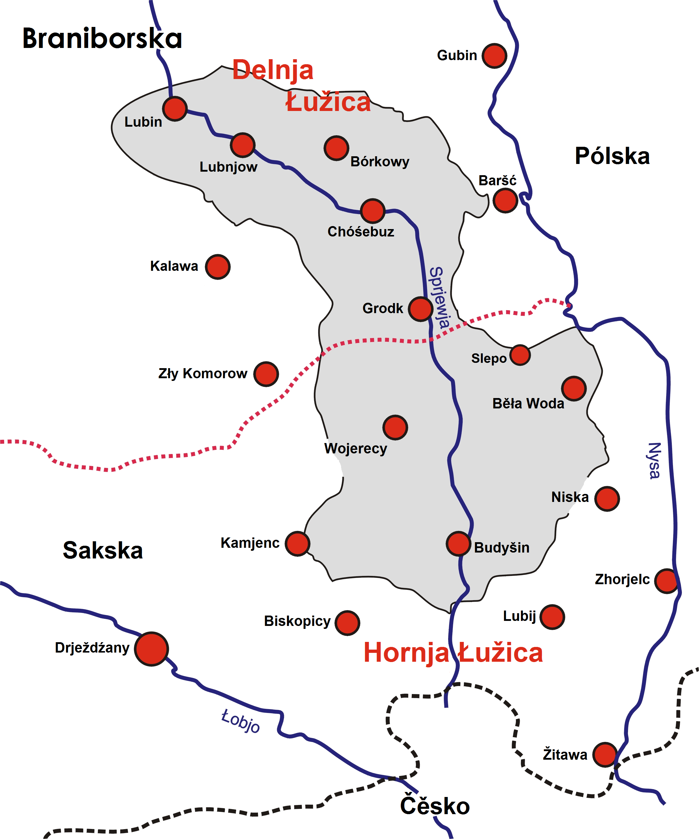 Sorbisches Siedlungsgebiet Hornjoserbsce: Domizna Serbow